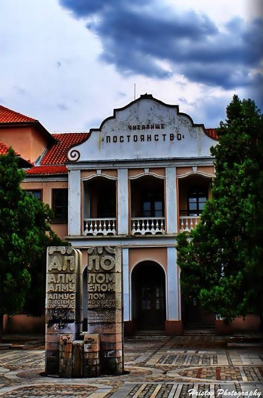 Първото Българско читалище -"Постоянство" град Лом